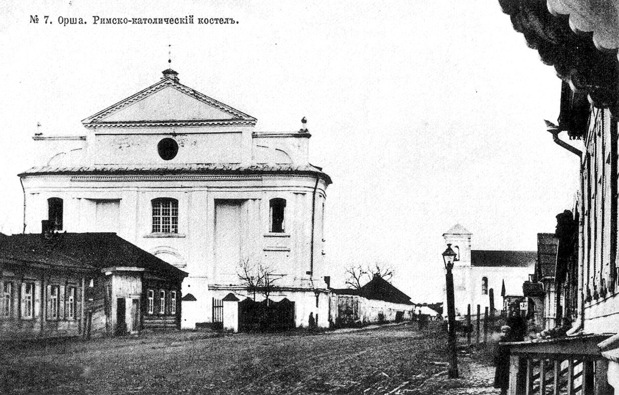 Беларуская (тарашкевіца): Ворша (Vorša), кряявід у боку вуліцы Дамінканскай (vulica Daminikanskaja). Касьцёл Сьвятога Язэпа пры кляштары дамініканаў, удалечыні відаць вежу касьцёла Сьвятога Антонія пры кляштары францішканаў